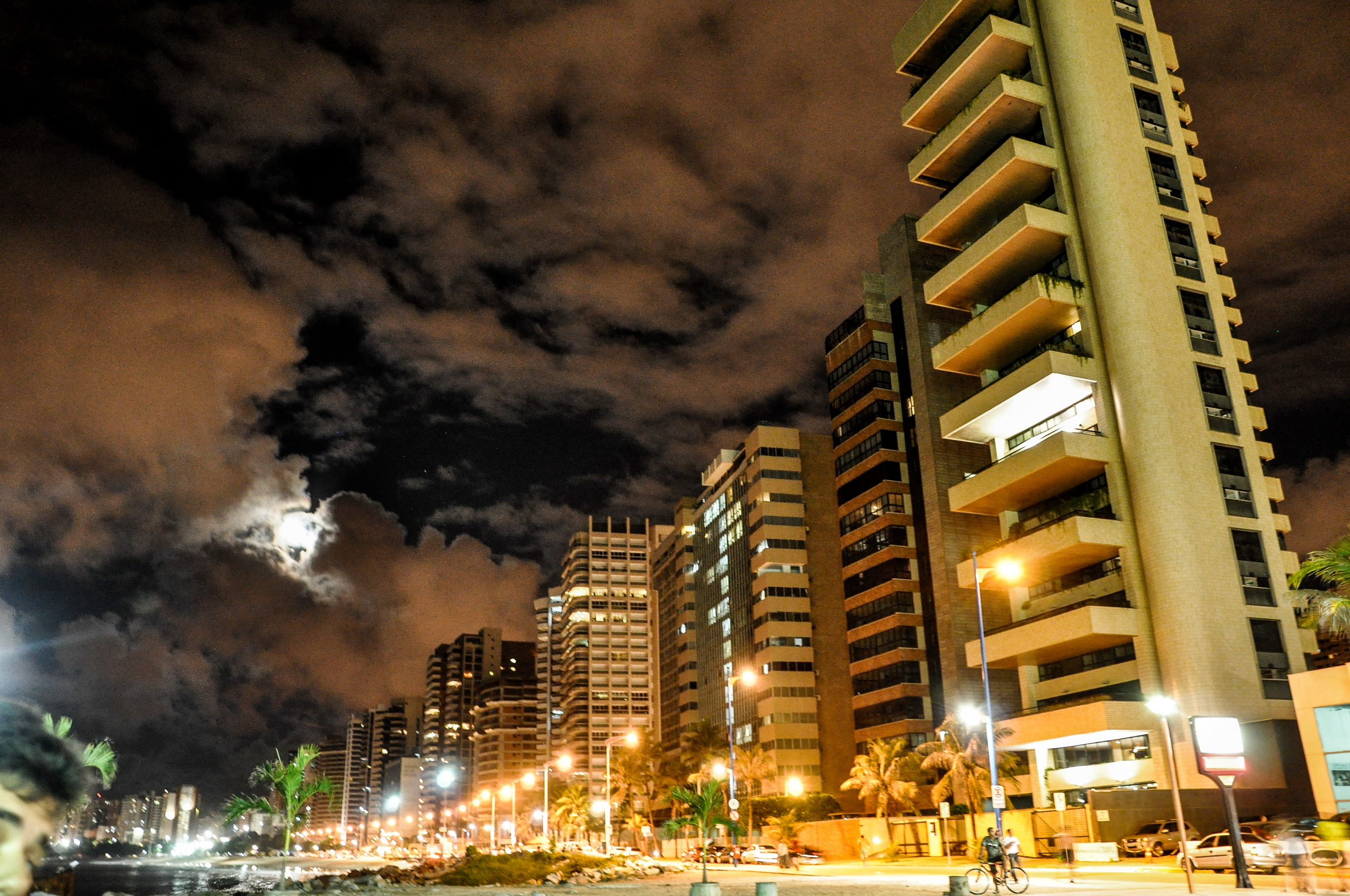 Beira Mar Fortaleza/Ce